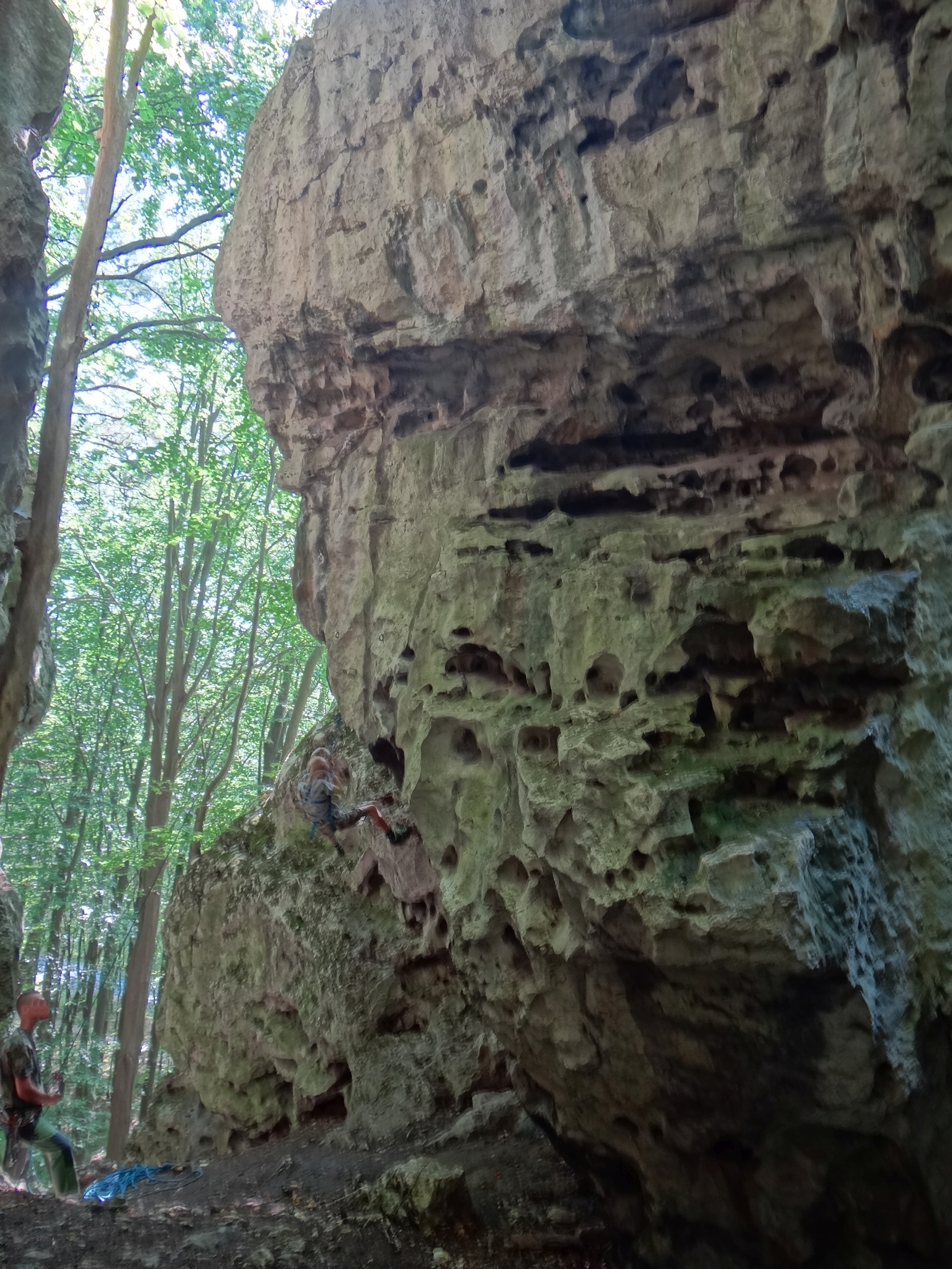 Skała Diabelski Mosty w Złotym Potoku